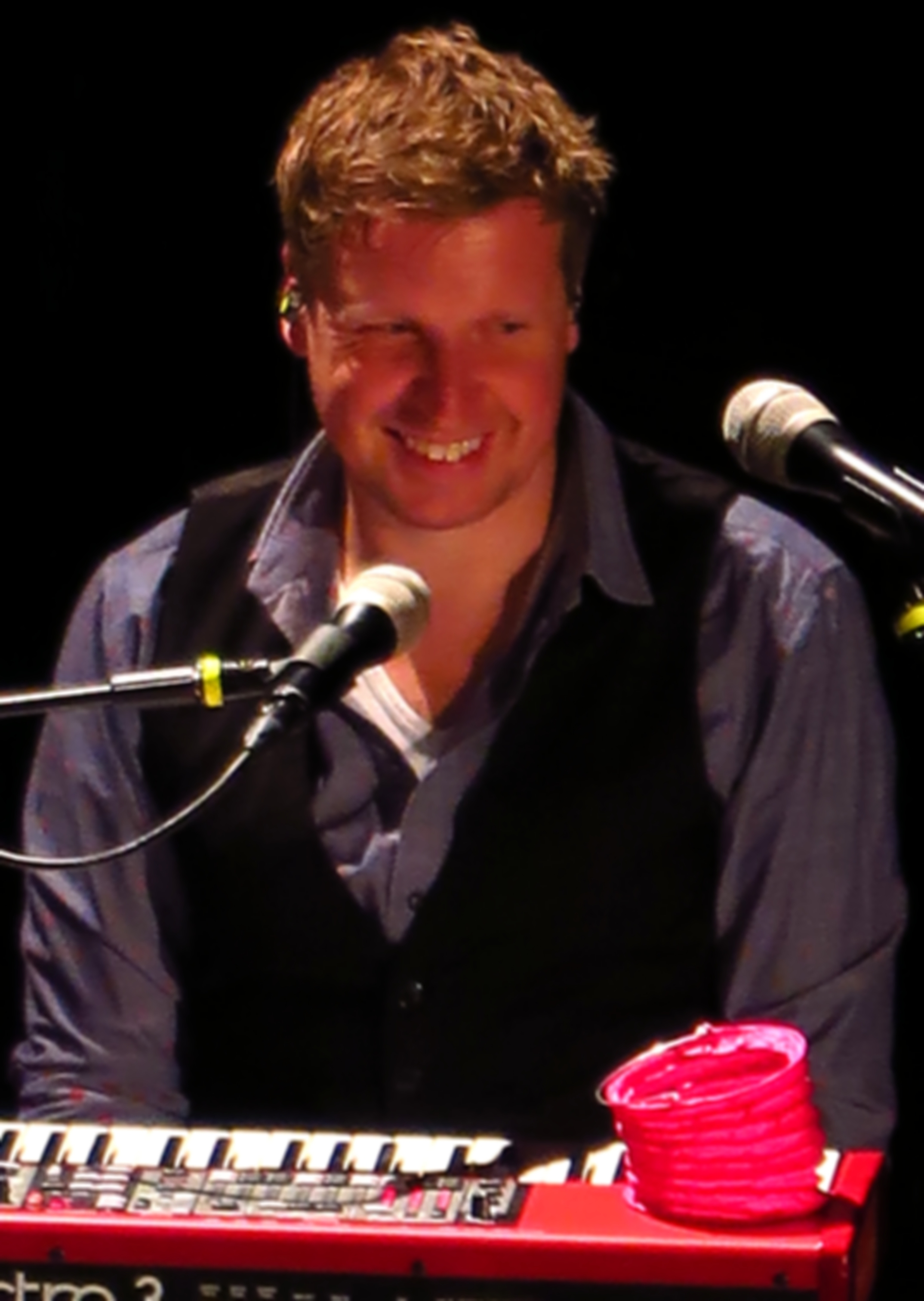 Gunnar Graewert, im Parktheater im Kurhaus Göggingen, Augsburg, im März 2015